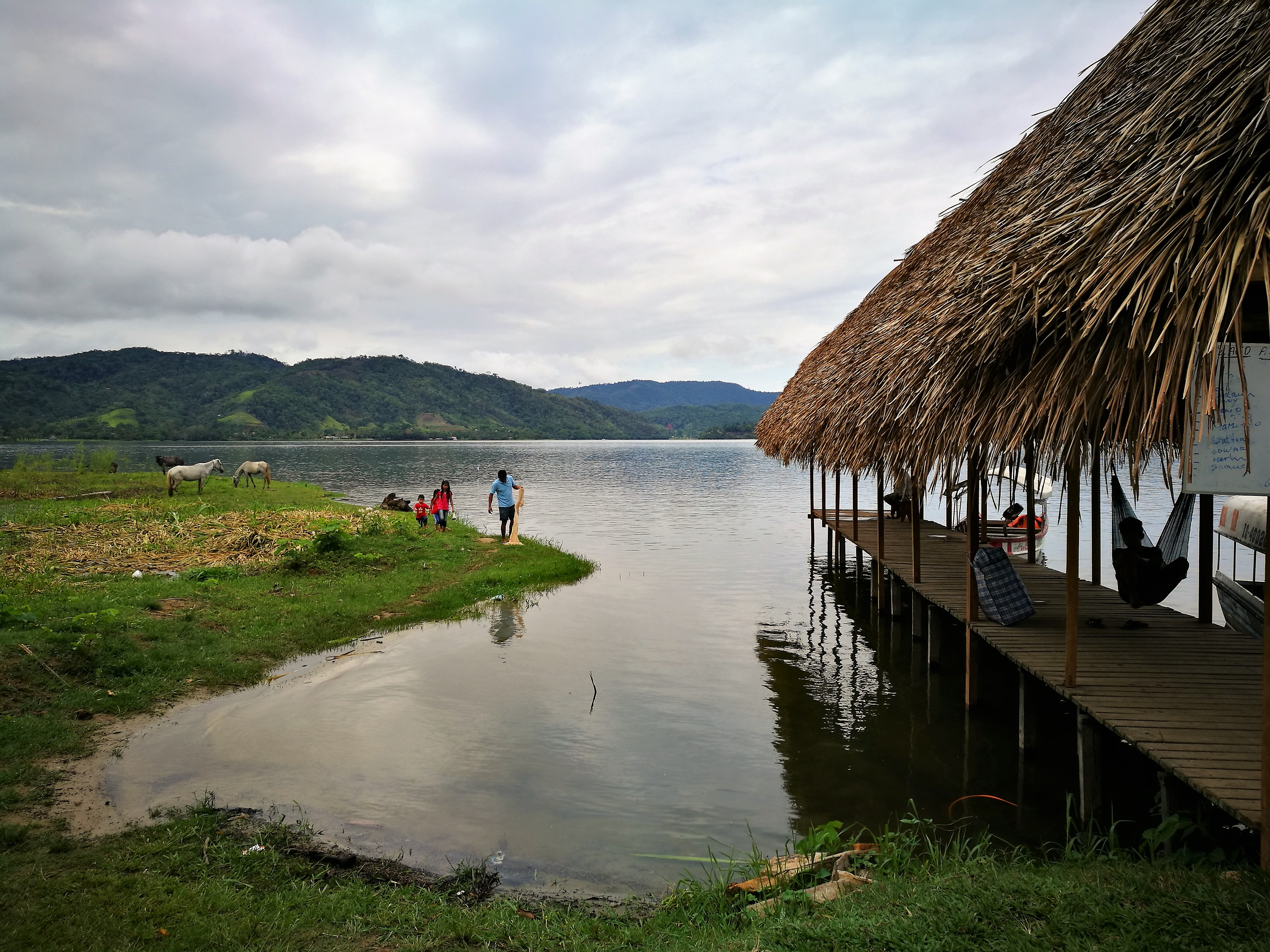 Port de Sauce a la Laguna de Sauce a la província de San Martín